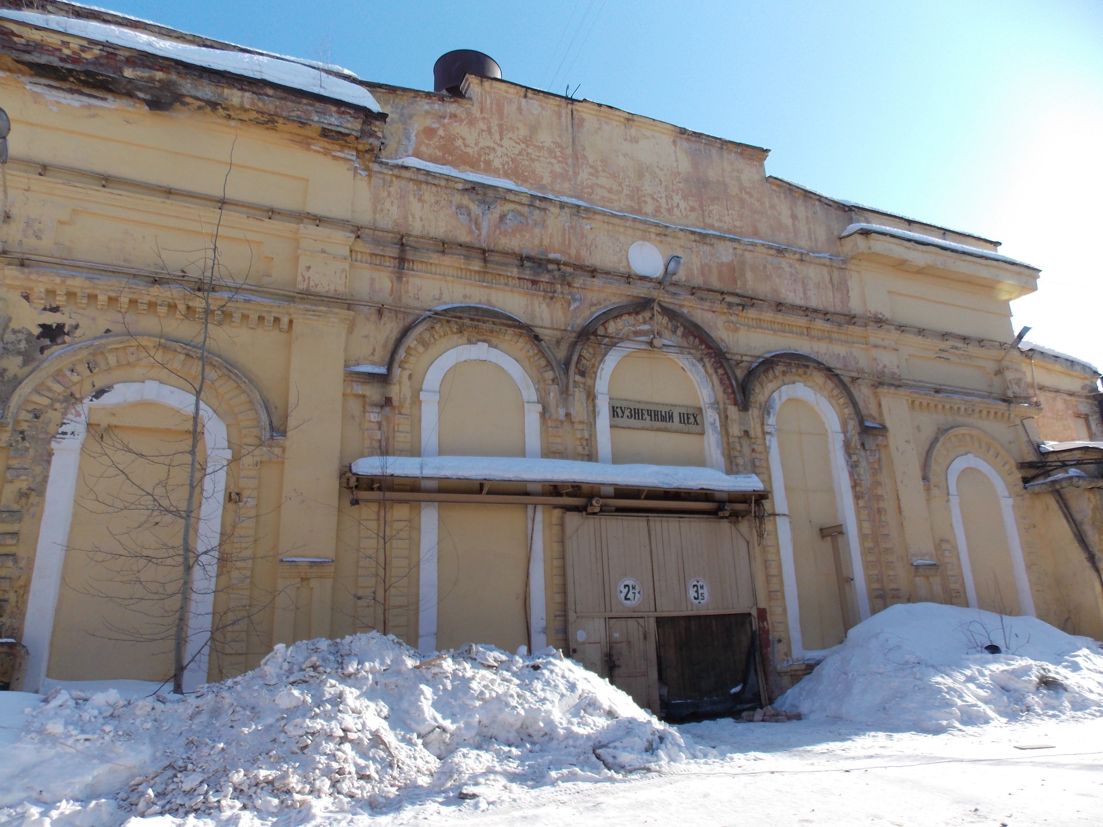 На первой площадке ОТЗ